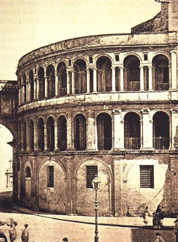 Obra Nova Seu València